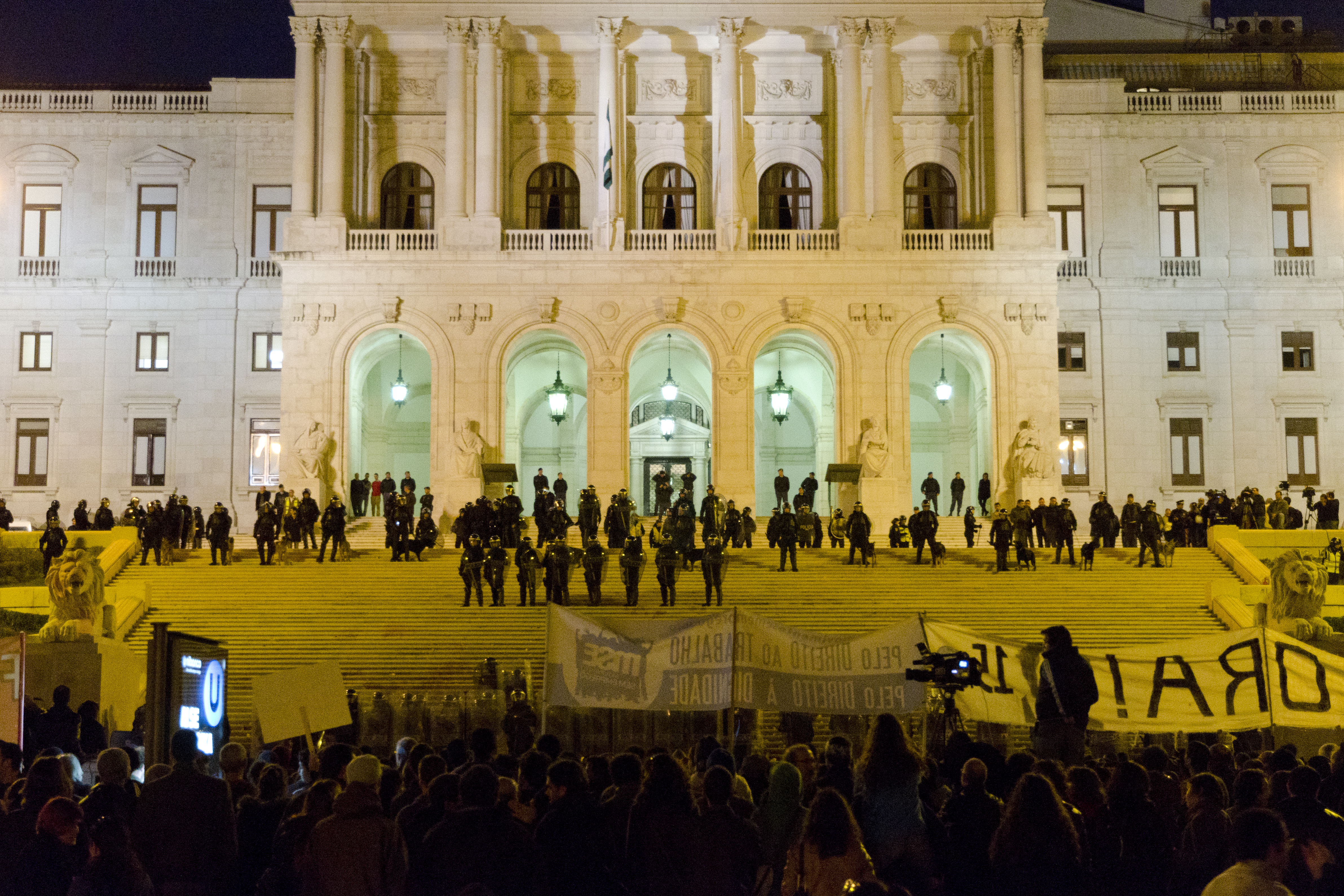 LISBOA_20121114_1287_ps